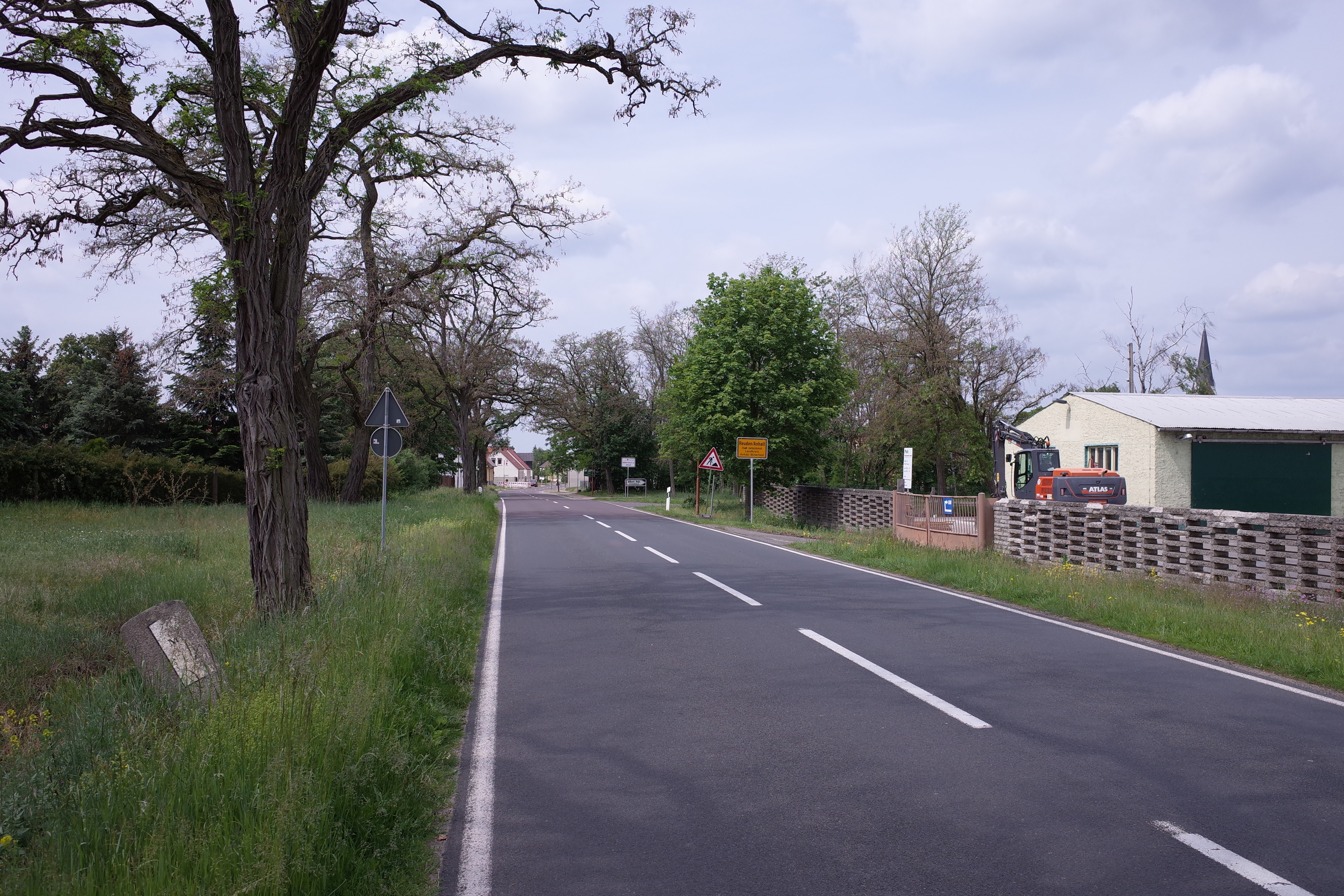 Stadt Zerbst (Anhalt), Ortsteil Reuden/Anhalt, Meilenstein am Ortseingang (2 Myriameter von Zerbst).